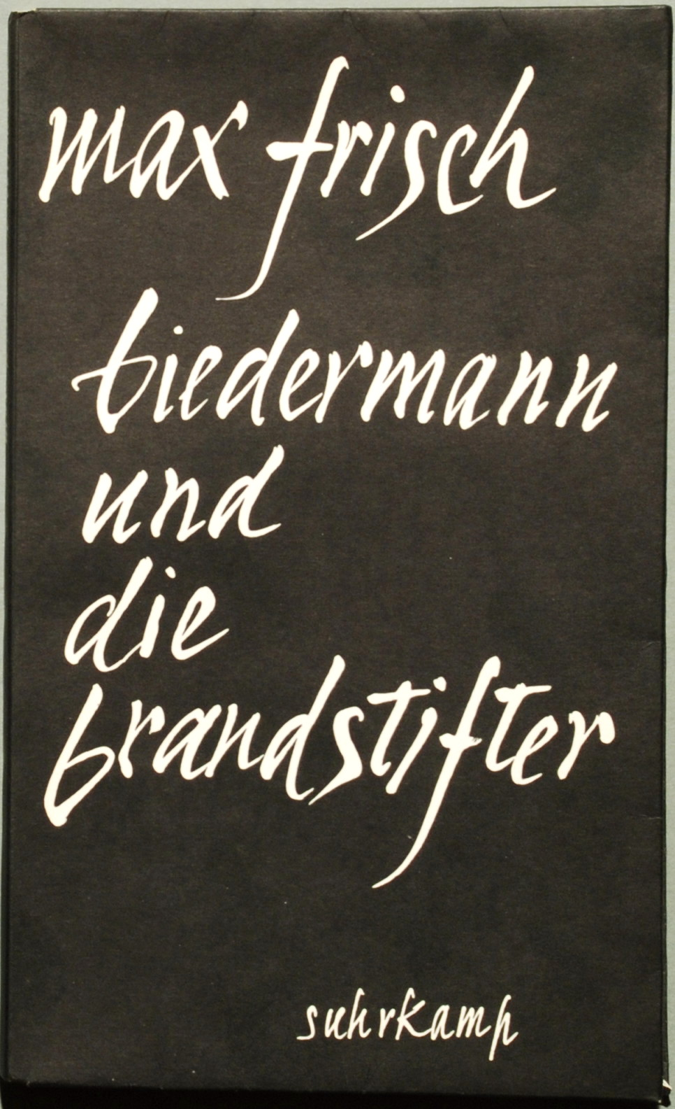 Frisch, Max: Biedermann und die Brandstifter. Ein Lehrstück ohne Lehre. Mit einem Nachspiel. Berlin und Frankfurt am Main: Suhrkamp 1958, 173 Seiten + 1 nicht paginierte Seite. Erstausgabe (Wilpert/Gühring² 24). Original-Karton 8° mit Rückenlängstitel, Gestaltung Imre Reiner. Uraufführung 1958 am Züricher Schauspielhaus.